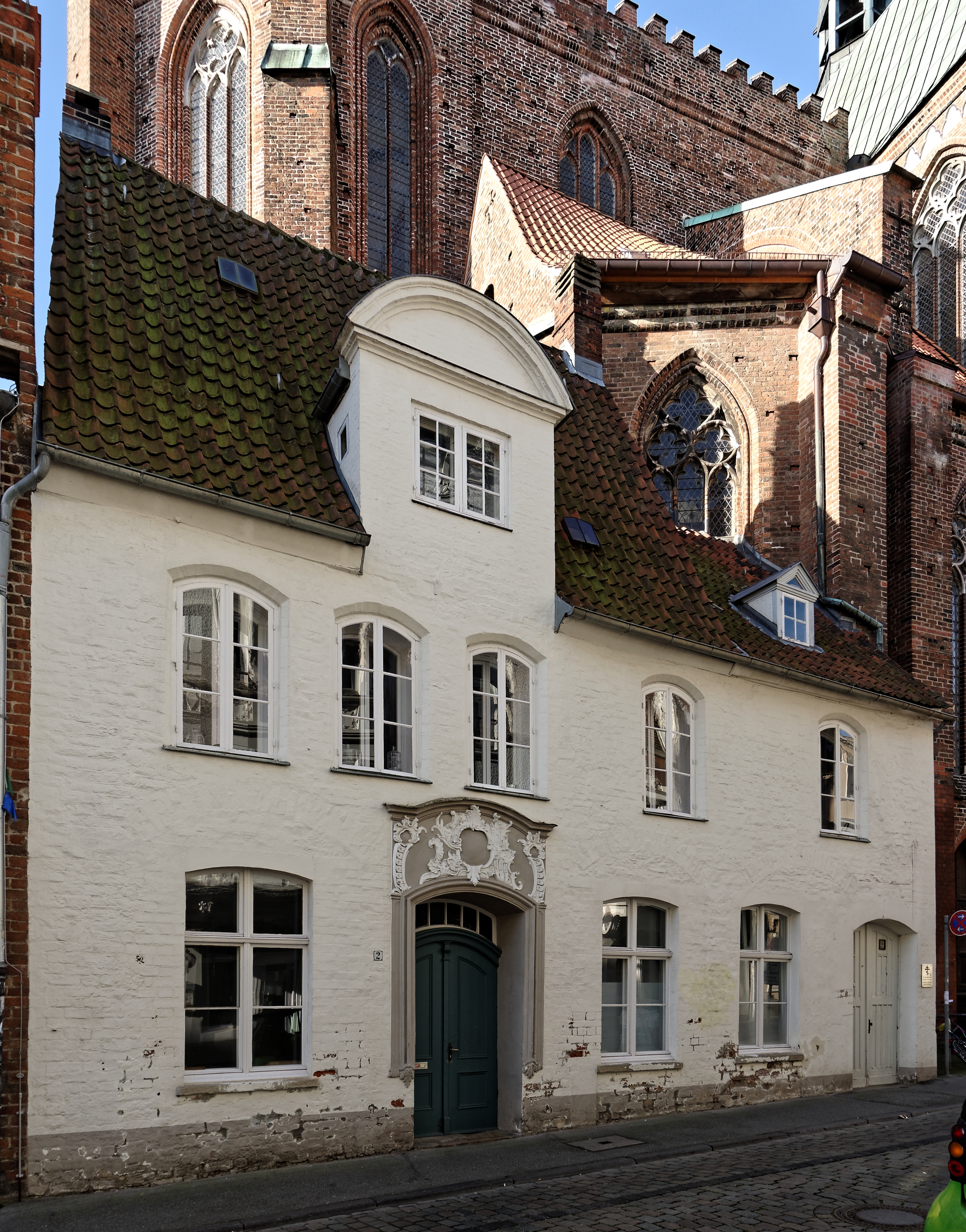 Glockengießerstraße 2